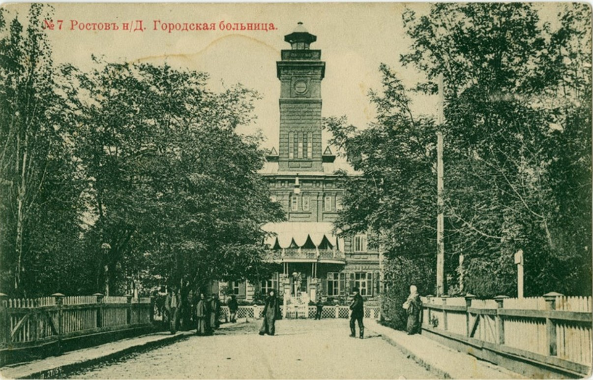 Ростов-на-Дону до Октябрьской революции. Городская больница. Фото на открытке.